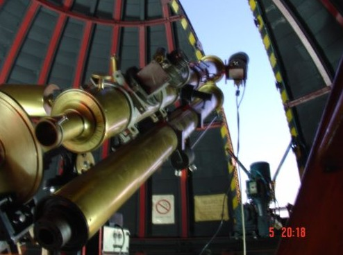 Telescopio ecuatorial Mailhat del Observatorio San José